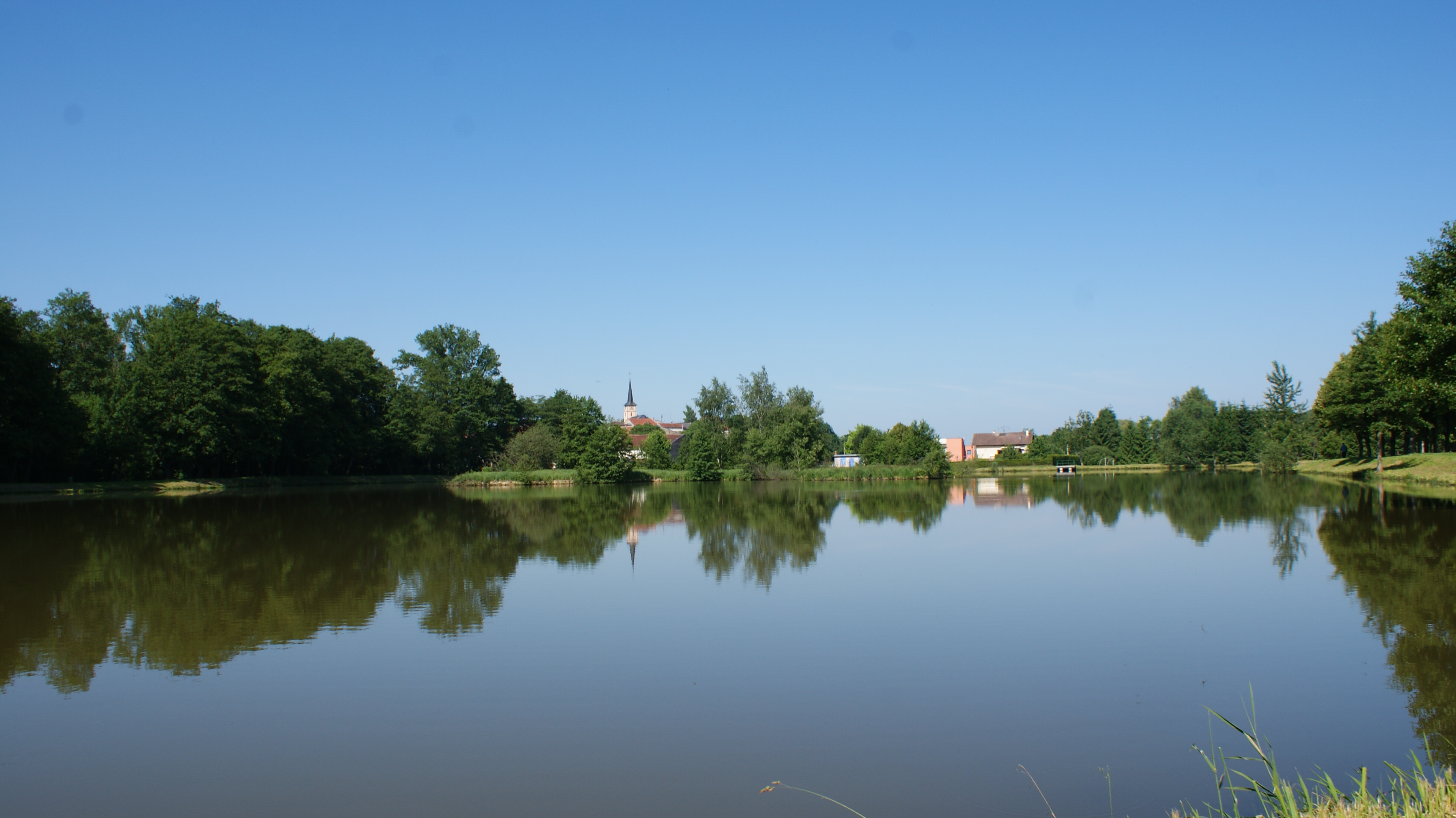 Etang